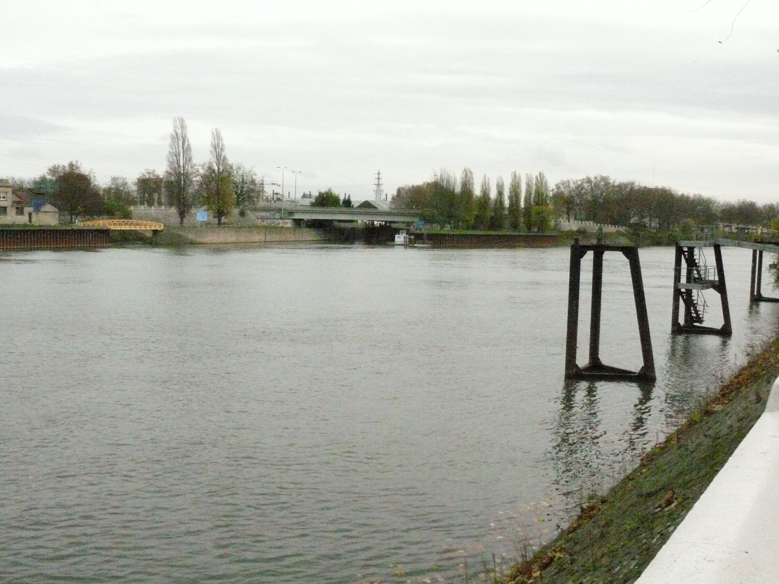 Conflience de la Vieille Mer (au pont jaune à gauche), du Canal Saint-Denis avec la Seine aux confins de Saint-Denis et d'Épinay-sur-Seine. La Vieille mer, petite rivière de Seine Saint denis, collecte notamment les eaux du Croult, de la Molette, de la Morée ...